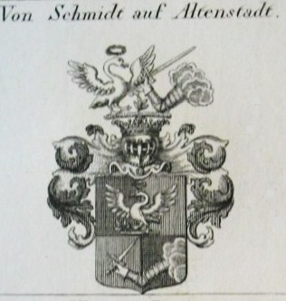 Gebessertes Wappen von 1713 derer "von Schmidt auf Altenstadt", die 1577 als "Fabricius" geadelt wurden.